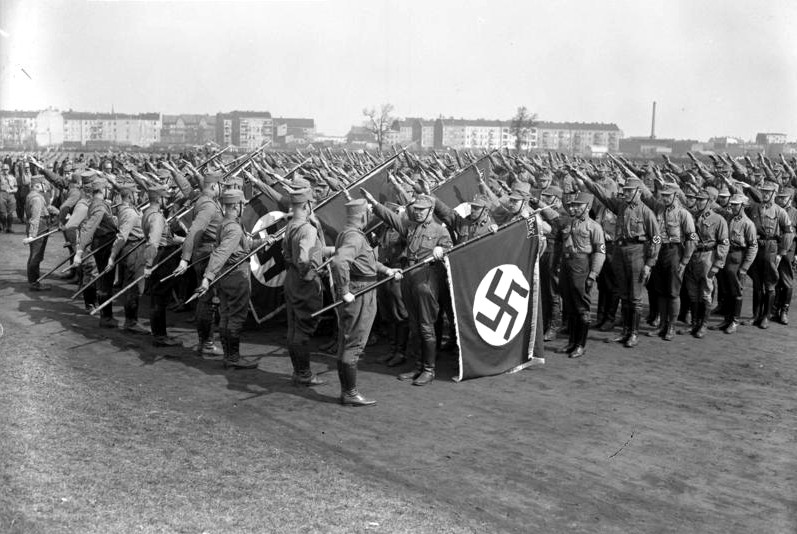 Berlin 1933:Sturmbann X der SA, Fahnenweihe und Vereidigung